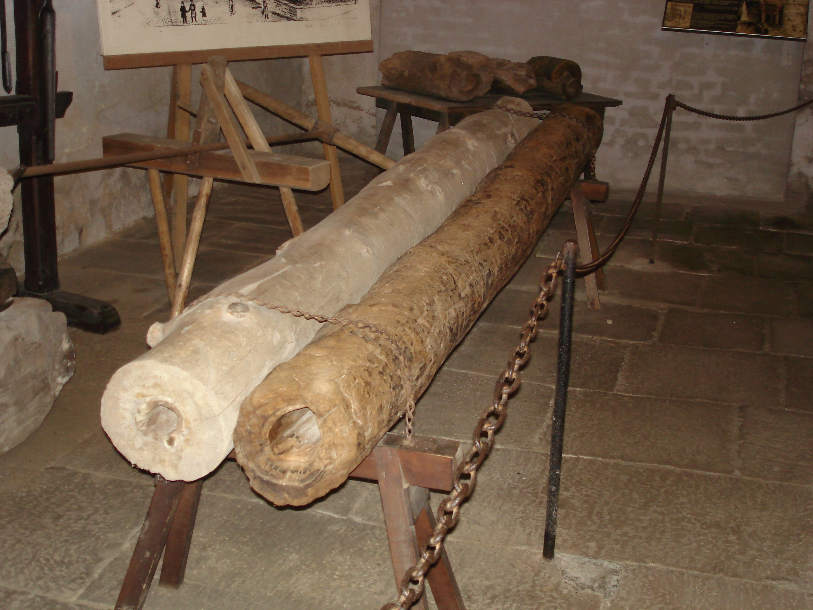 Erhaltene Rohre der Wasserkunst auf Burg Stolpen